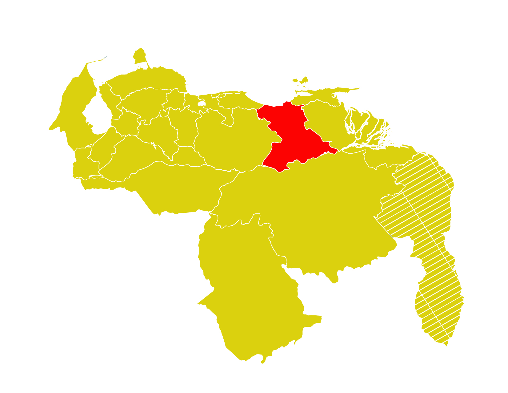 ubicacion de anzoategui